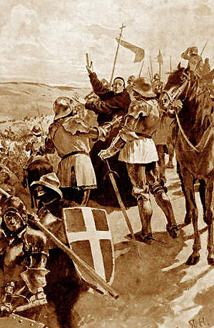 Papežský legát Jindřich z Beafortu se snaží zastavit prchající križáky po bitvě u Tachova 1427